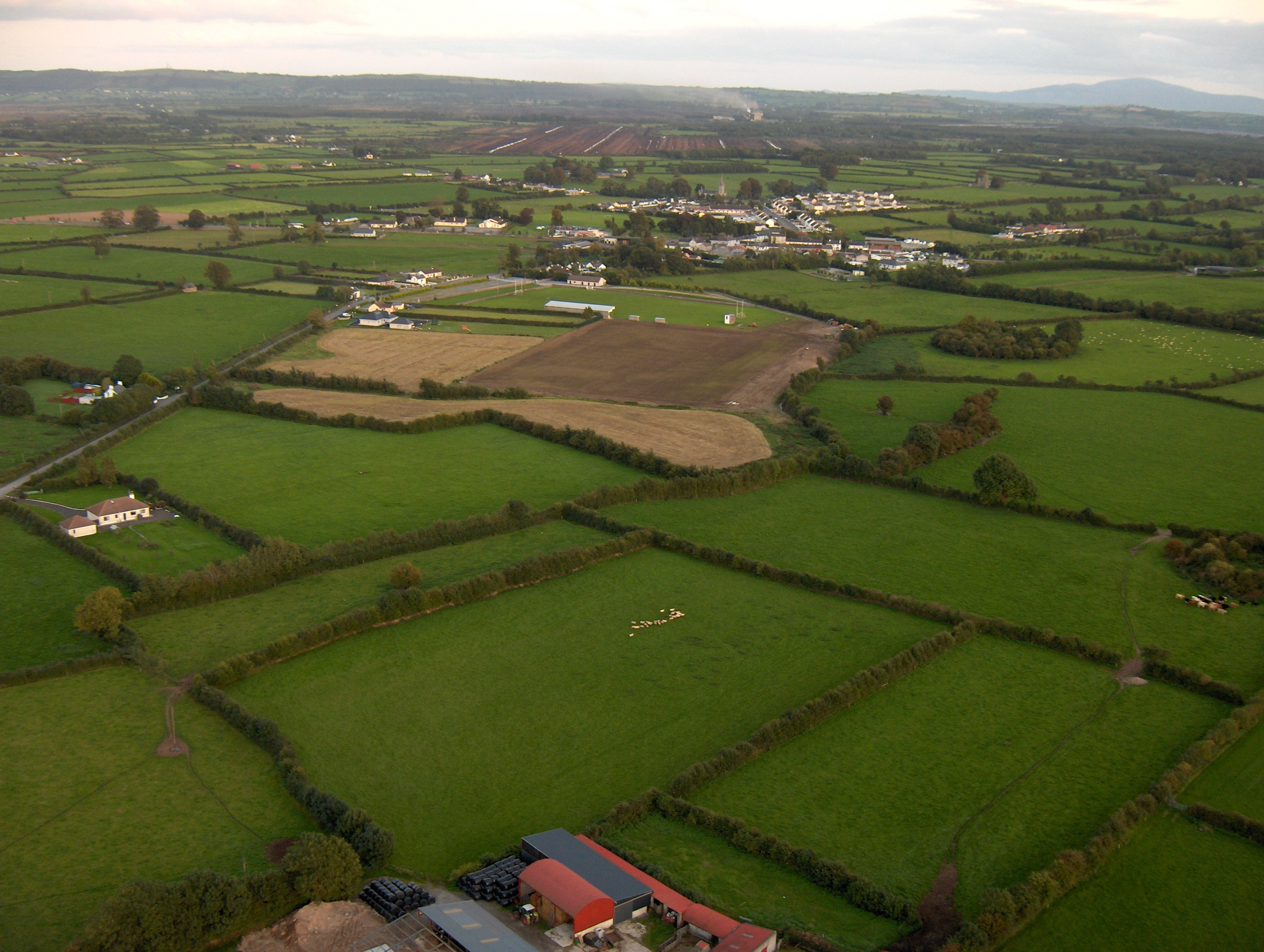 Urlingford